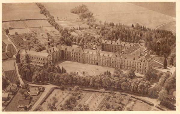 Хирівський конвікт - навчальний заклад отців-єзуїтів